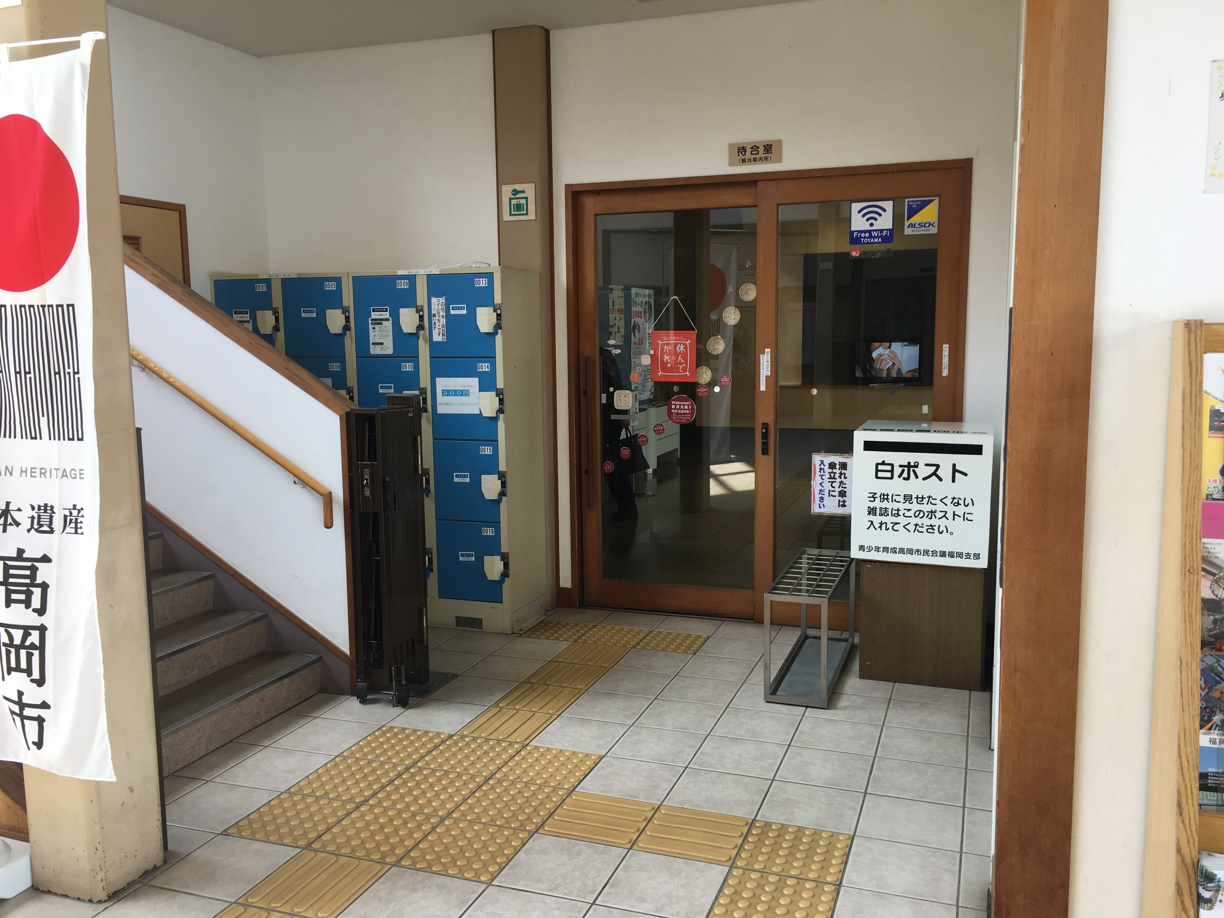 あいの風とやま鉄道福岡駅待合室